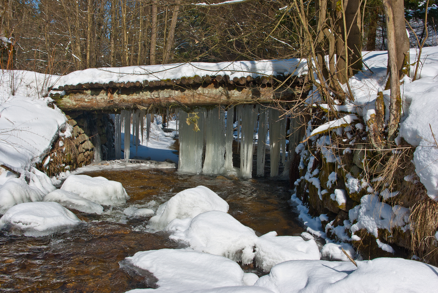 Lobezský potok ve Slavkovsém lese, nad Sokolovem